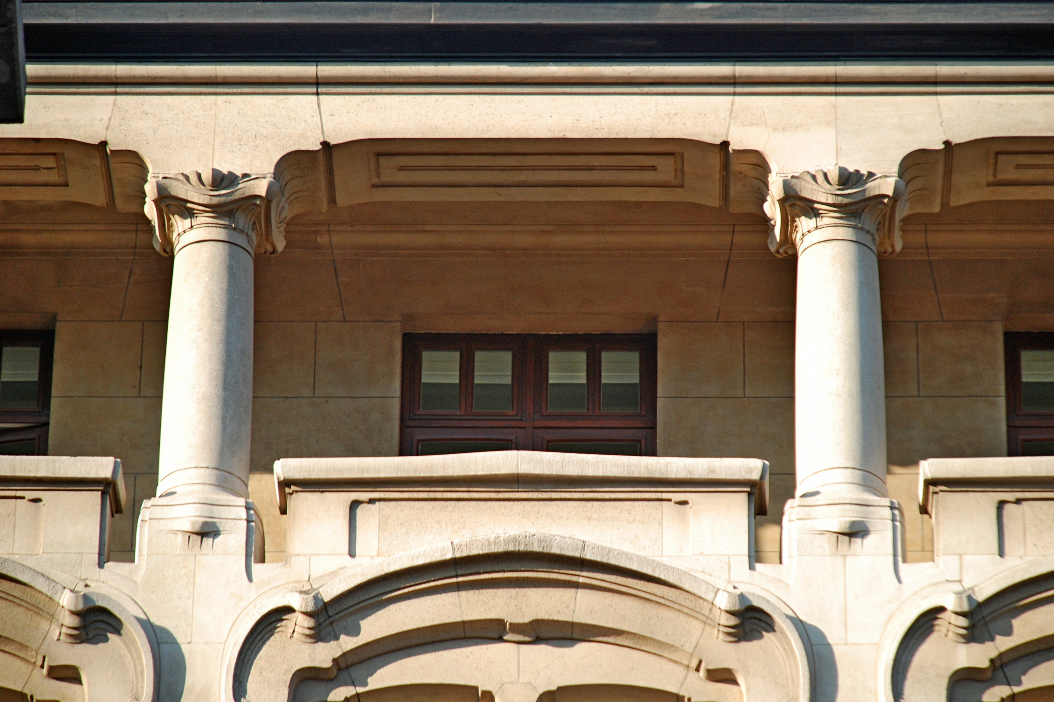 Belgique - Bruxelles - Anciens magasins Wolfers frères (Art nouveau, architecte Victor Horta, 1909)